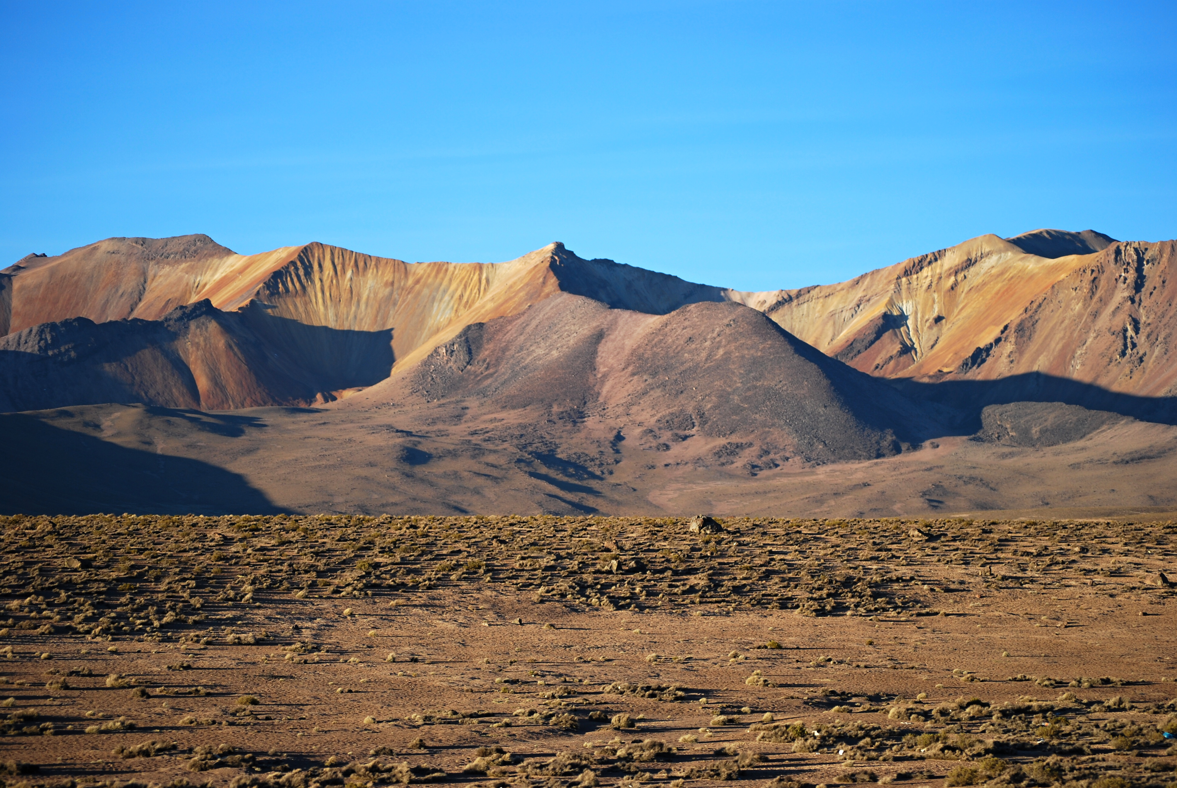 Cestou do města Arica - Chile